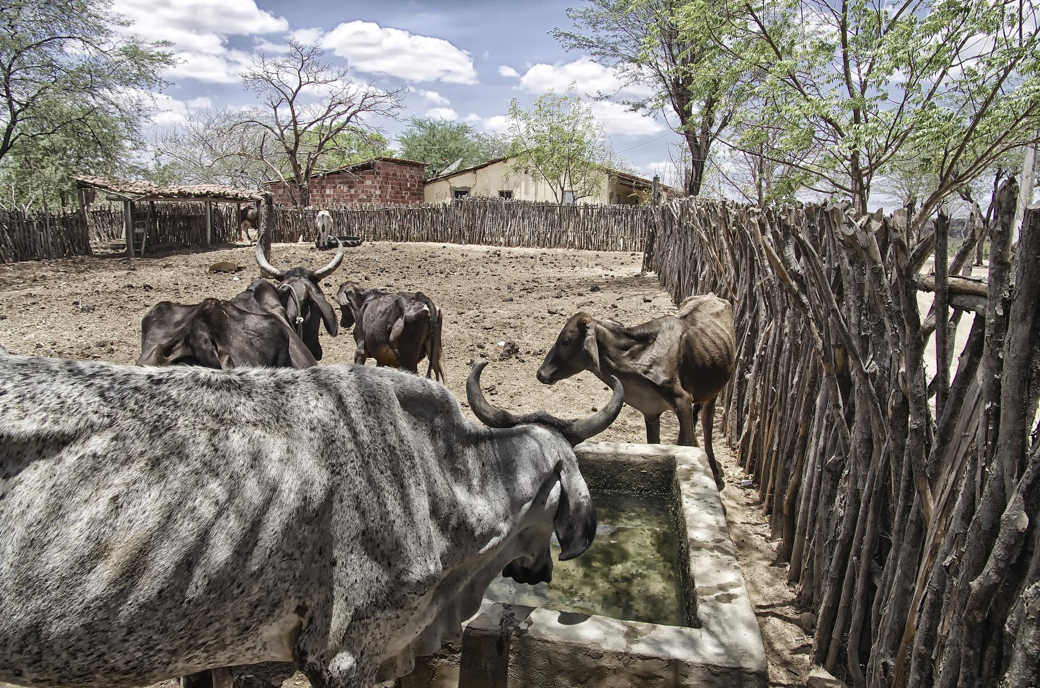 No rumo de Caridade